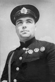 Герой Советского Союза Токарев Николай Александрович